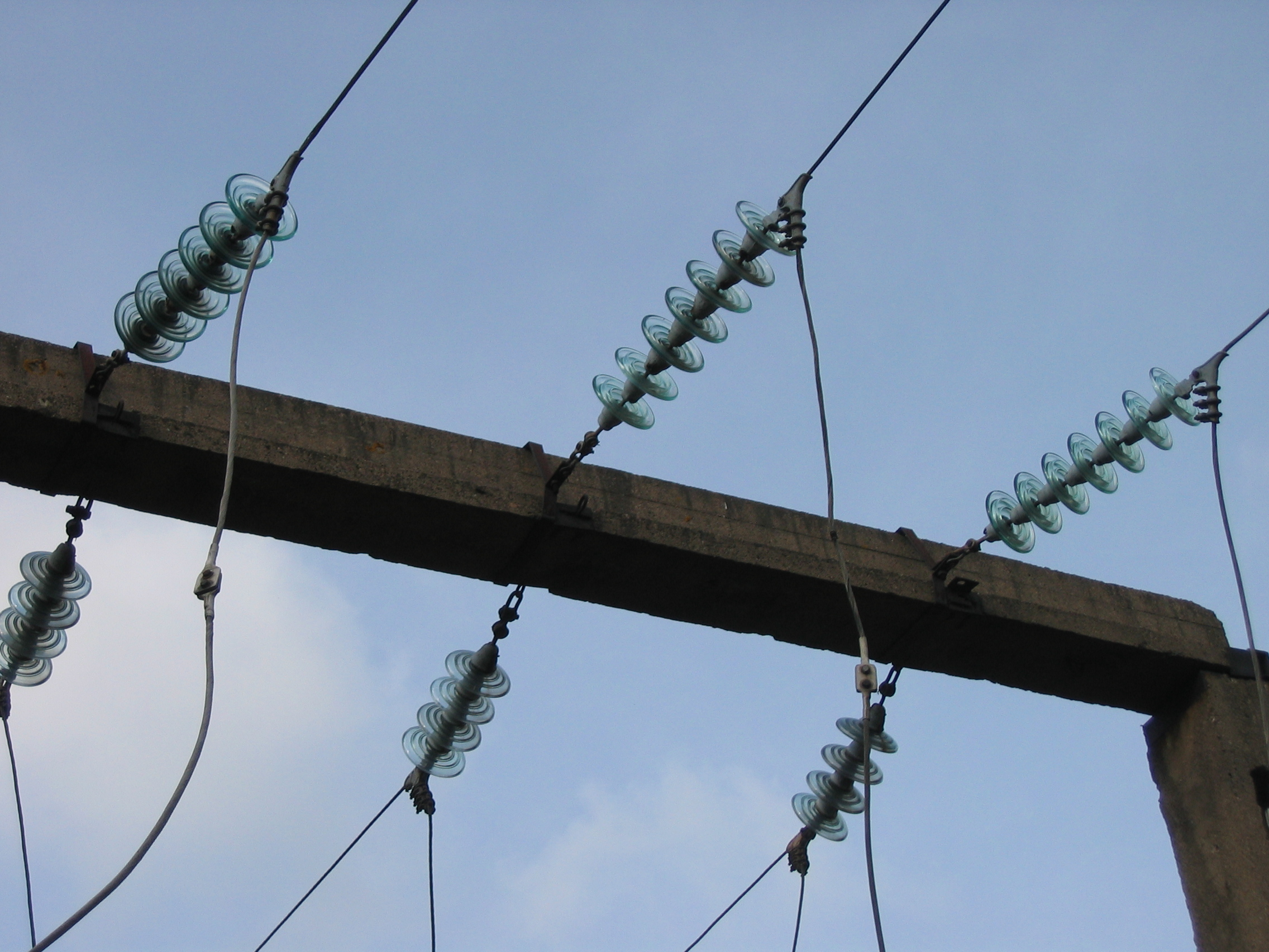 Подвесные линейные изоляторы на ОРУ. (High-voltage Transmission Insulators)